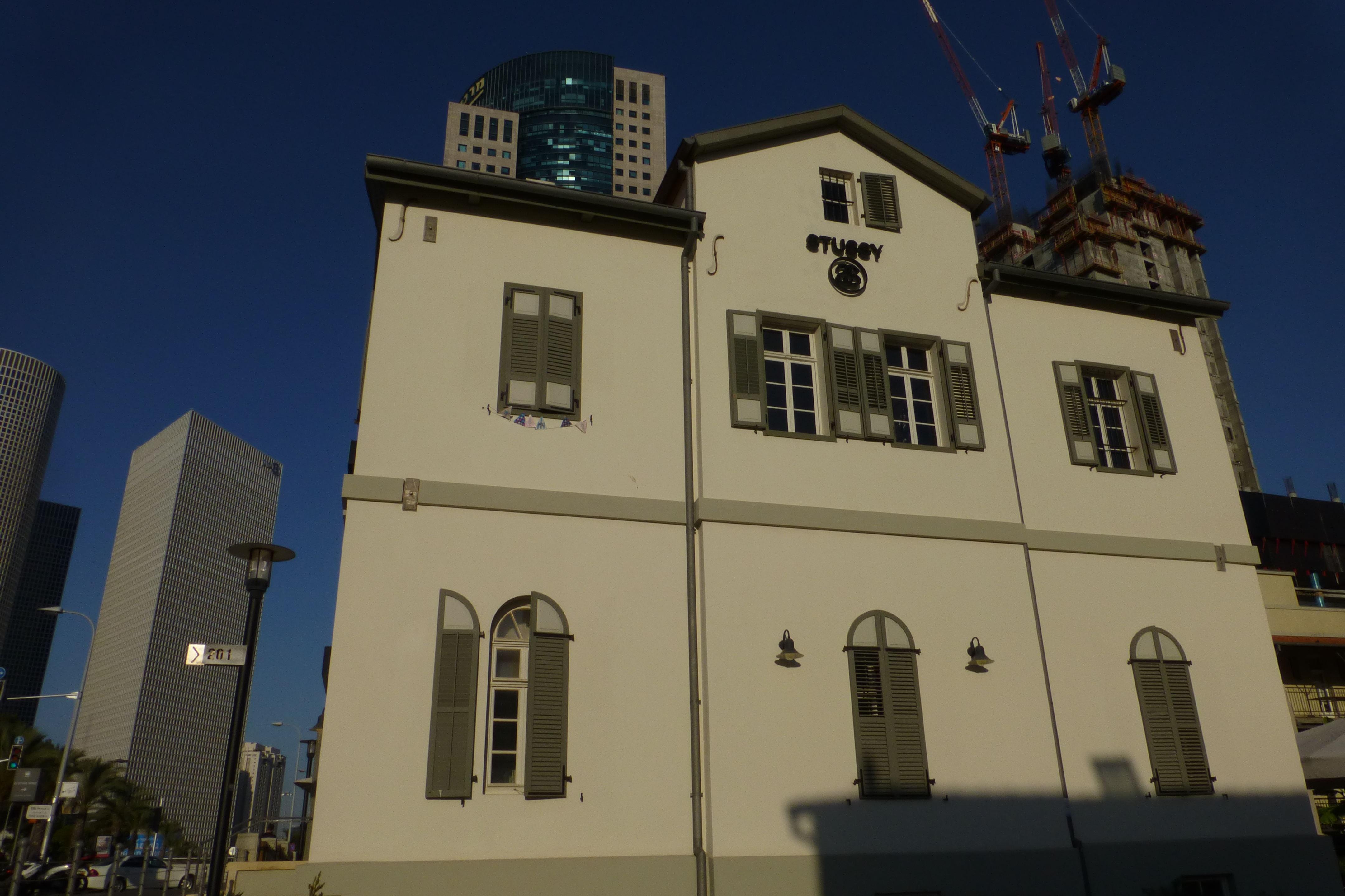 שׂרונה היא המושבה הרביעית שהקימו הגרמנים הטמפלרים בארץ ישראל במחצית השנייה של המאה ה-19. המושבה הוקמה ארבעה קילומטרים צפונית ליפו, ואחרוני בתיה שוכנים כיום בתל אביב בין שדרות שאול המלך מצפון, דרך בגין במזרח, רחוב הארבעה מדרום, ומגרשי החנייה של אחוזות החוף ממערב. מקצתם נמצאים היום בתוך בסיס הקריה.